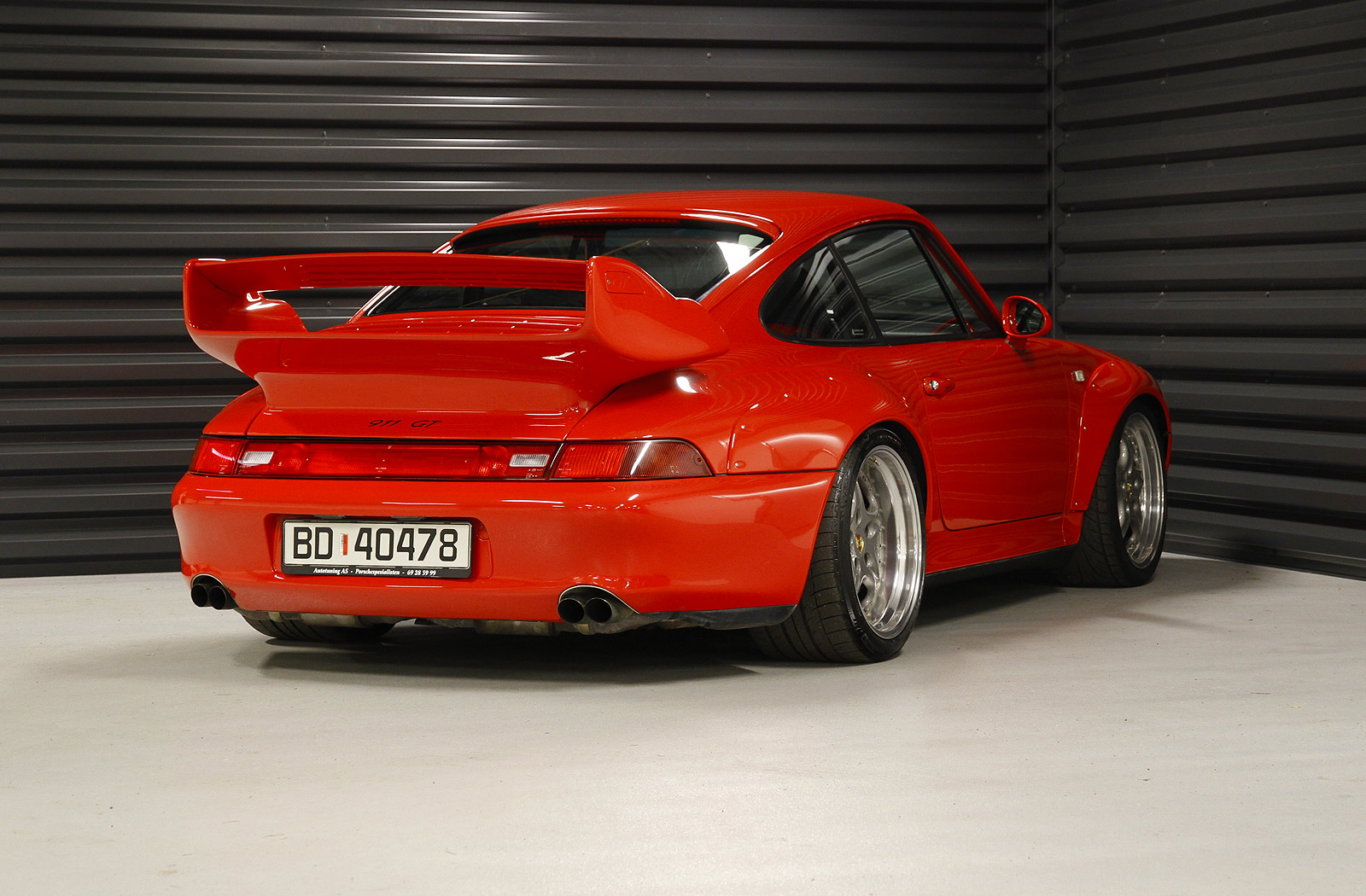 1996 Porsche 911 993 GT2